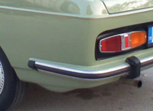 Türkiye'de seri olarak üretilen ilk otomobil markası Anadol'dan bir görünüm.